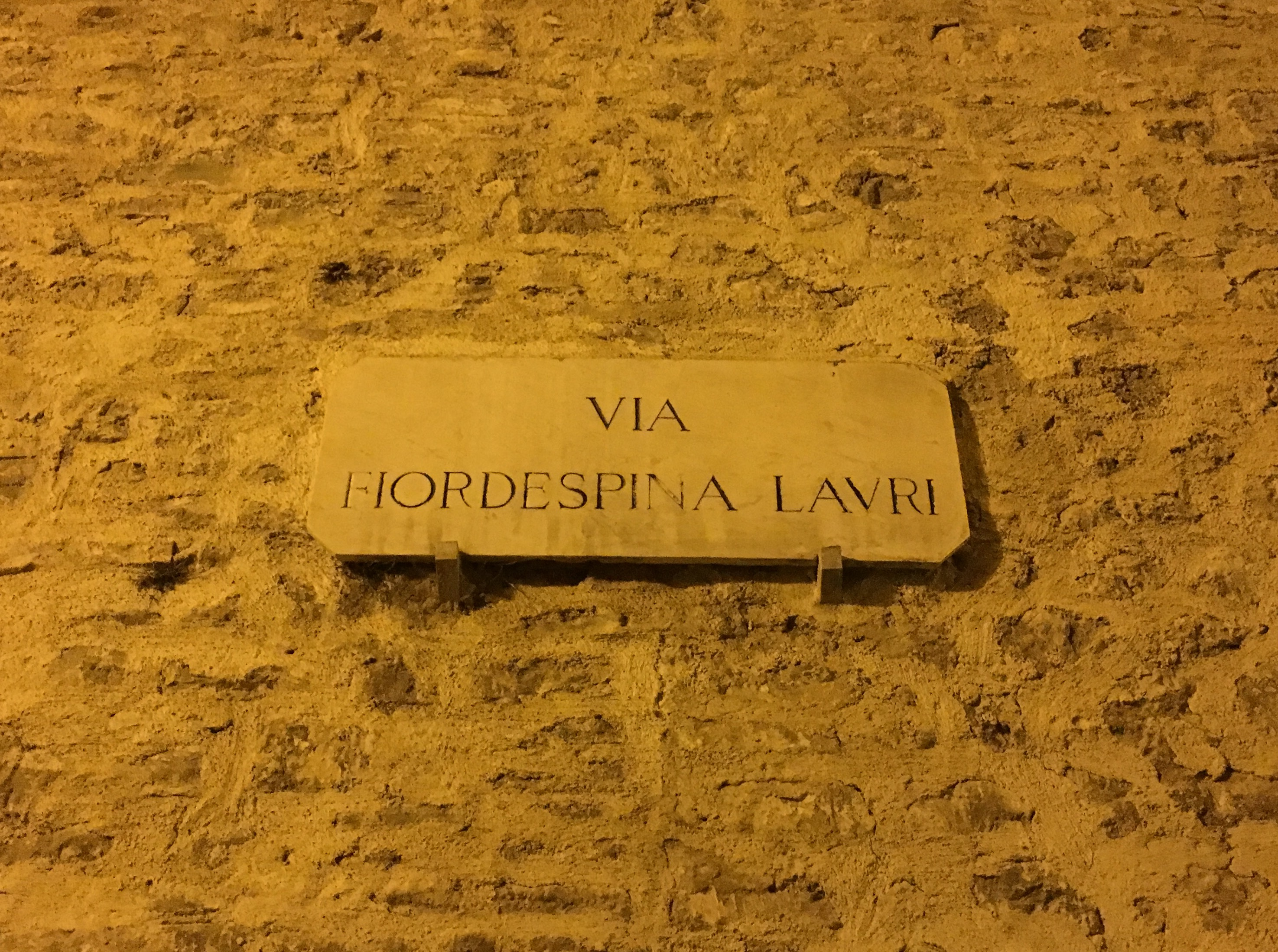 via Fiordespina Lauri